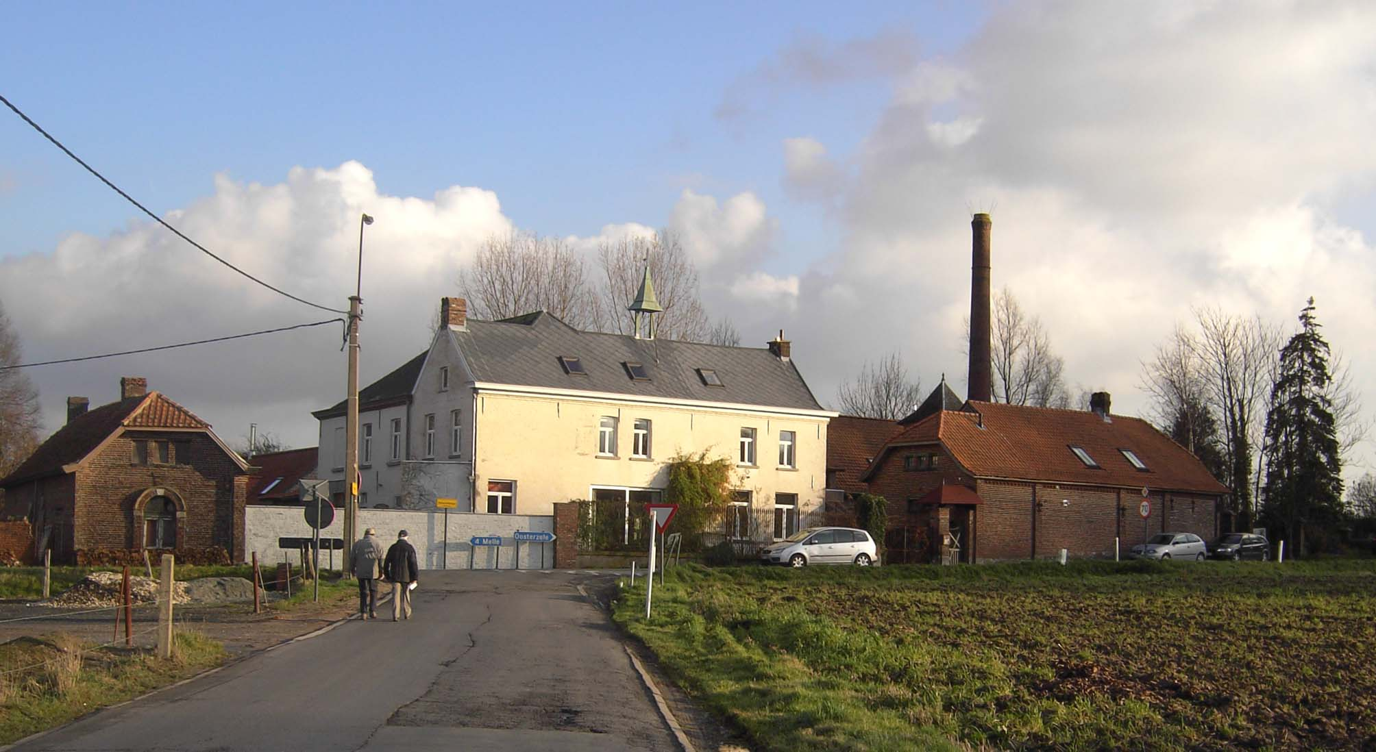 Stokerij Van De Velde - Landskouter - Oosterzele - Oost-Vlaanderen - België